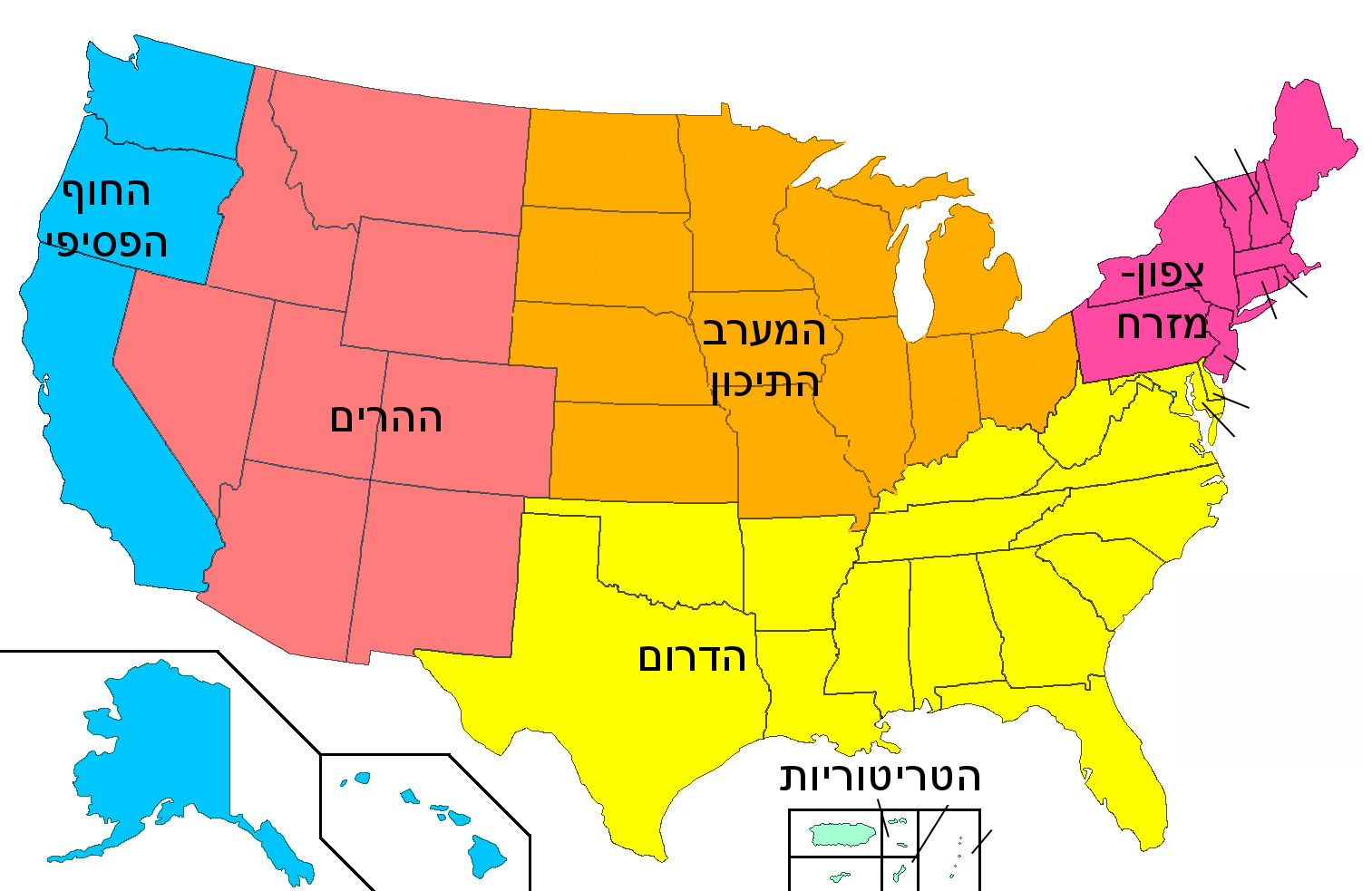 אוזרים סטטיסטיים ארה"ב